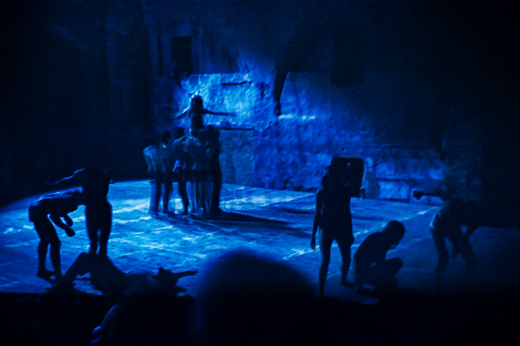 Living Theatre, Paradise now, Cloître des Carmes